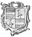 Wappen der Freiherren von Schackmin (oder Jacquemin)